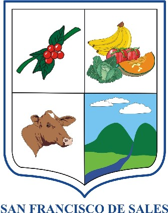 San francisco escudo